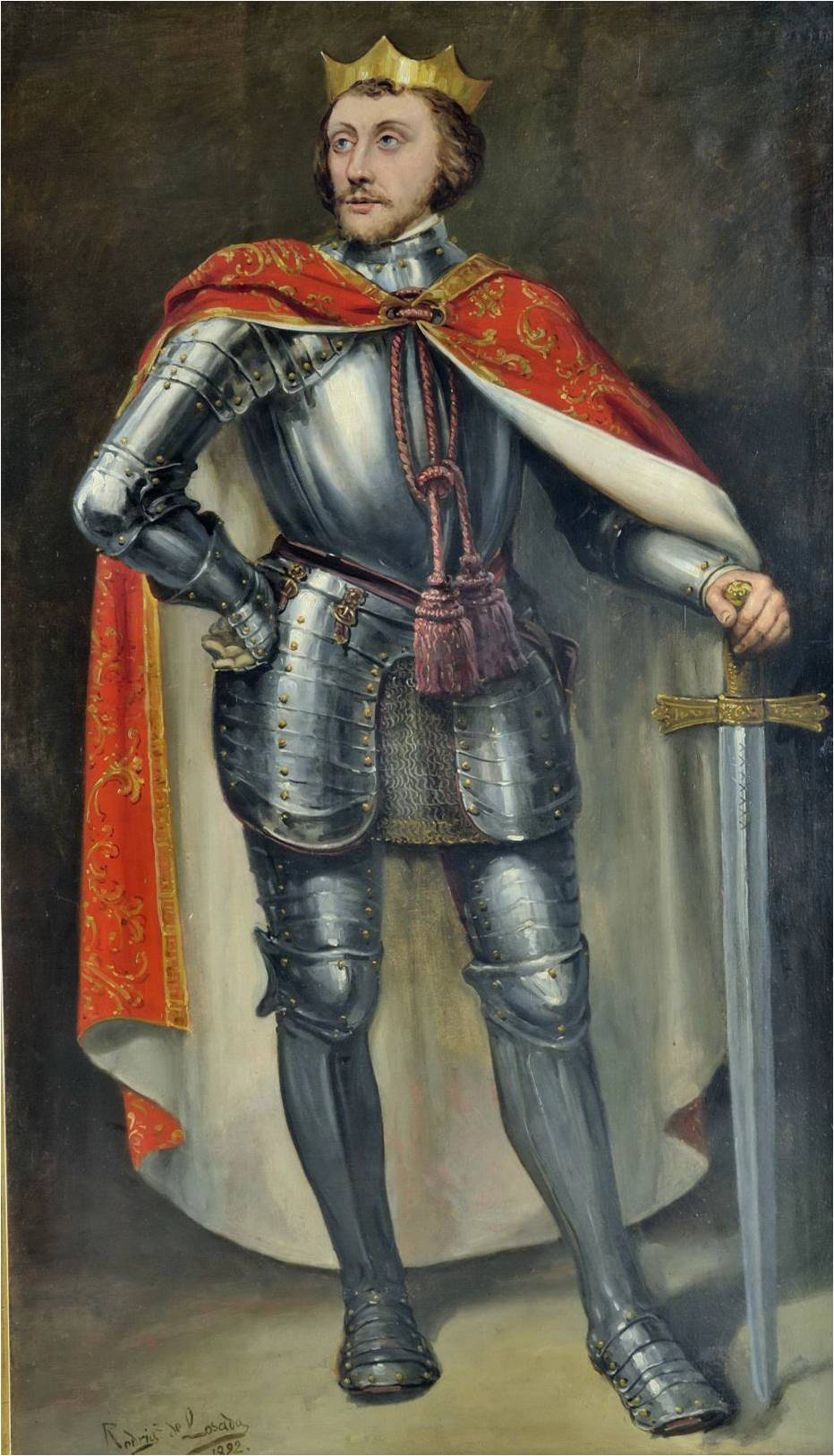 Retrato imaginario del rey Pedro I de Castilla (1334-1369). Fue hijo del rey Alfonso XI de Castilla y de la reina María de Portugal. Fue conocido como "Pedro I el Cruel" debido a las numerosas personas que mandó matar, entre las que se contaban varios de sus propios hermanastros. Fue asesinado en 1369, cuando contaba 34 años de edad, por su hermanastro Enrique II de Castilla, que le sucedió en el trono. Y los restos de Pedro I descansan en la capilla real de la catedral de Sevilla.